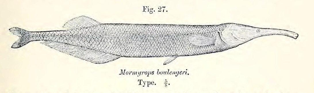 Tubenmaul-Nilhecht (Oxymormyrus boulengeri) (Pellegrin, 1900)